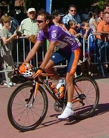 Iban Mayo, con el maillot morado, en el control de firmas de Miranda de Ebro (2006).